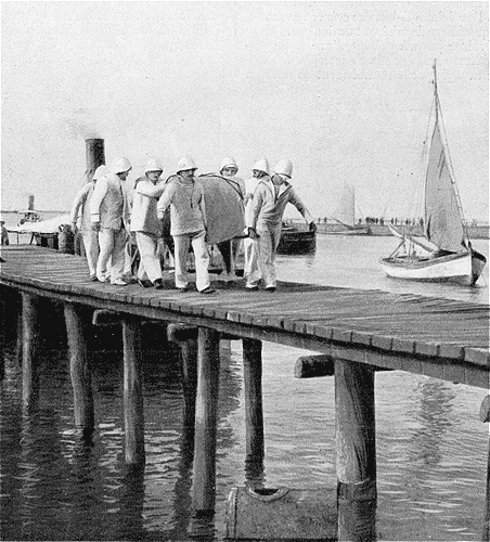 "Sur l'appontement, de Dakar.--Le transport de M. de Brazza à la voiture d'ambulance qui va le conduire à l'hôpital."